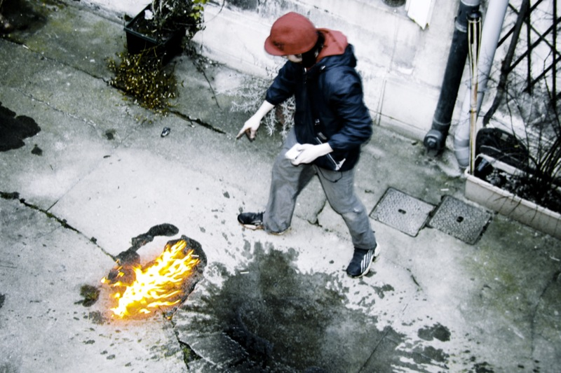 pyromania